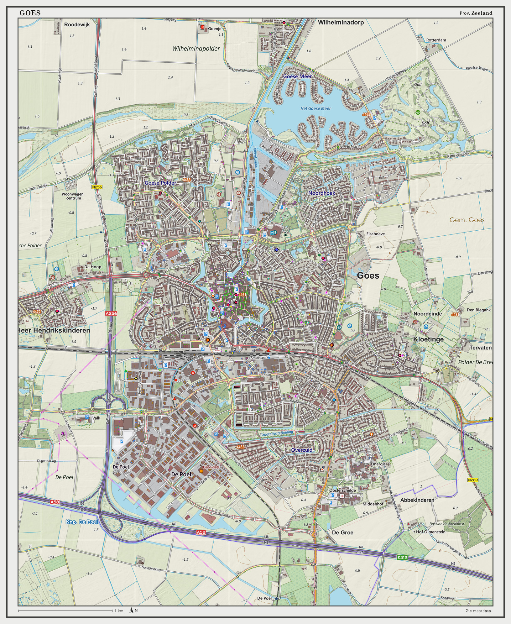 Topografische kaart van Goes (woonplaats). Resolutie: 300 pixels/km. Kaartbeeld samengesteld uit de open geodata van de Top10NL en Top25namen (Basisregistratie Topografie, Kadaster), Creative Commons BY licentie. Gebouwvlakken uit open geodata BAG extract. Wegen uit de OpenStreetMap, OpenStreetMap community. Reliëfschaduw uit de Actuele Hoogtekaart AHN2. Samenstelling en kleurenschema: Jan-Willem van Aalst, met QGIS2. Zie ook de Legenda.